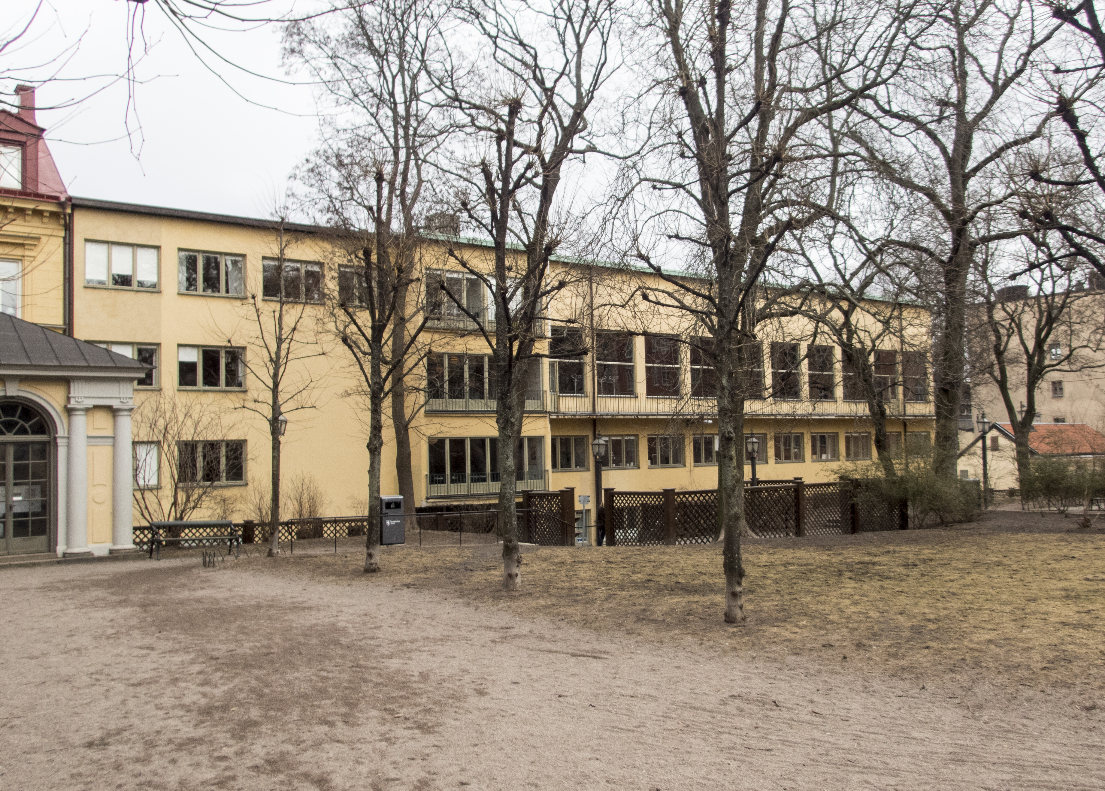 Stockholms Universitets Studentkårs tidigare kårhus, Holländargatan 32 Nybyggnadsår 1935 - 1937 Olle Engkvist (Byggmästare), Paul Hedqvist (Arkitekt), Stockholms Universitets Studentkår (Byggherre)